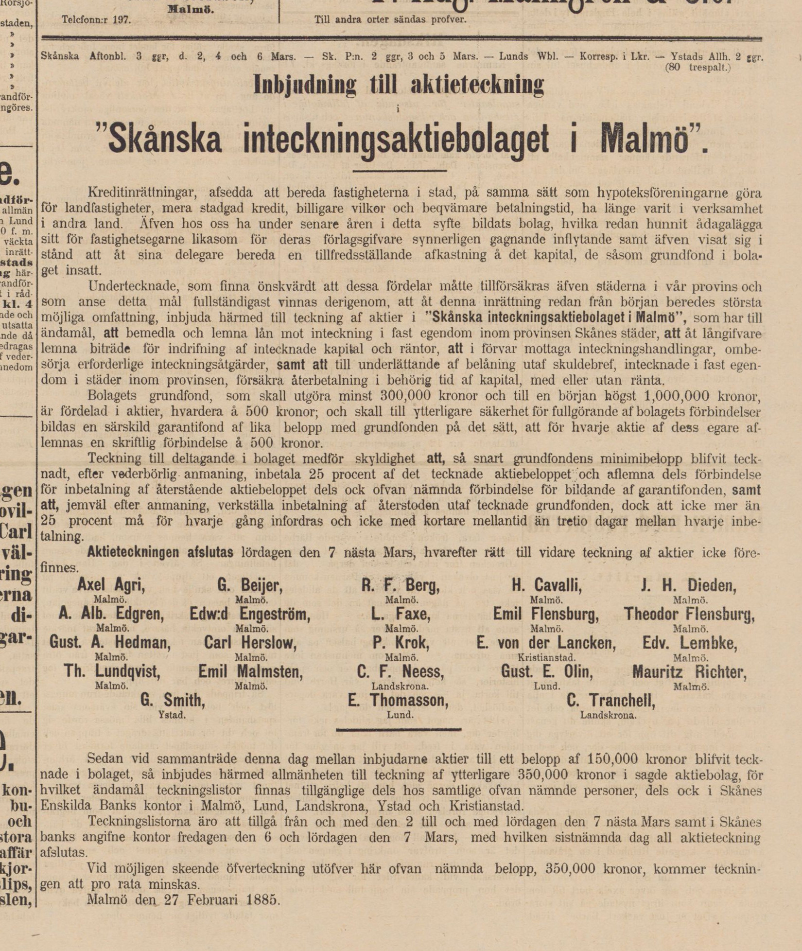 Annons i Sydsvenska Dagbladet Snällposten 2 mars 1885 för inbjudan till aktieteckning i Skånska inteckningsaktiebolaget i Malmö.